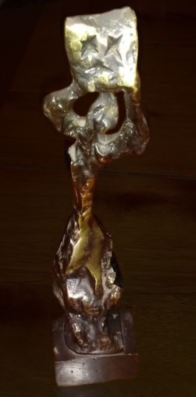 Estatuilla Premio Aregentores otorgada por la Sociedad General de Autores de la Argentina en 2009.